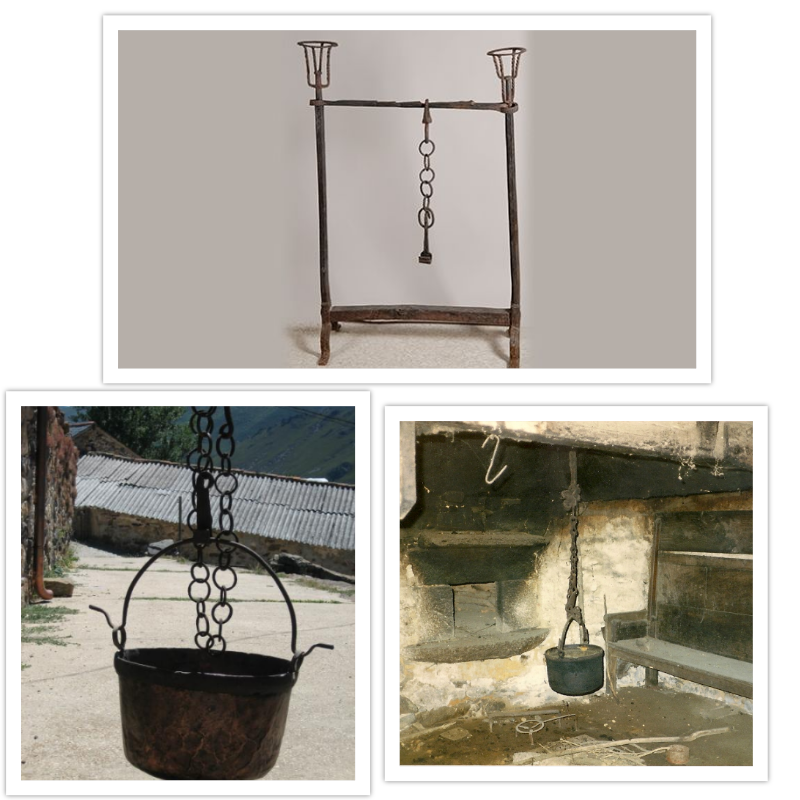 Ejemplos de llares